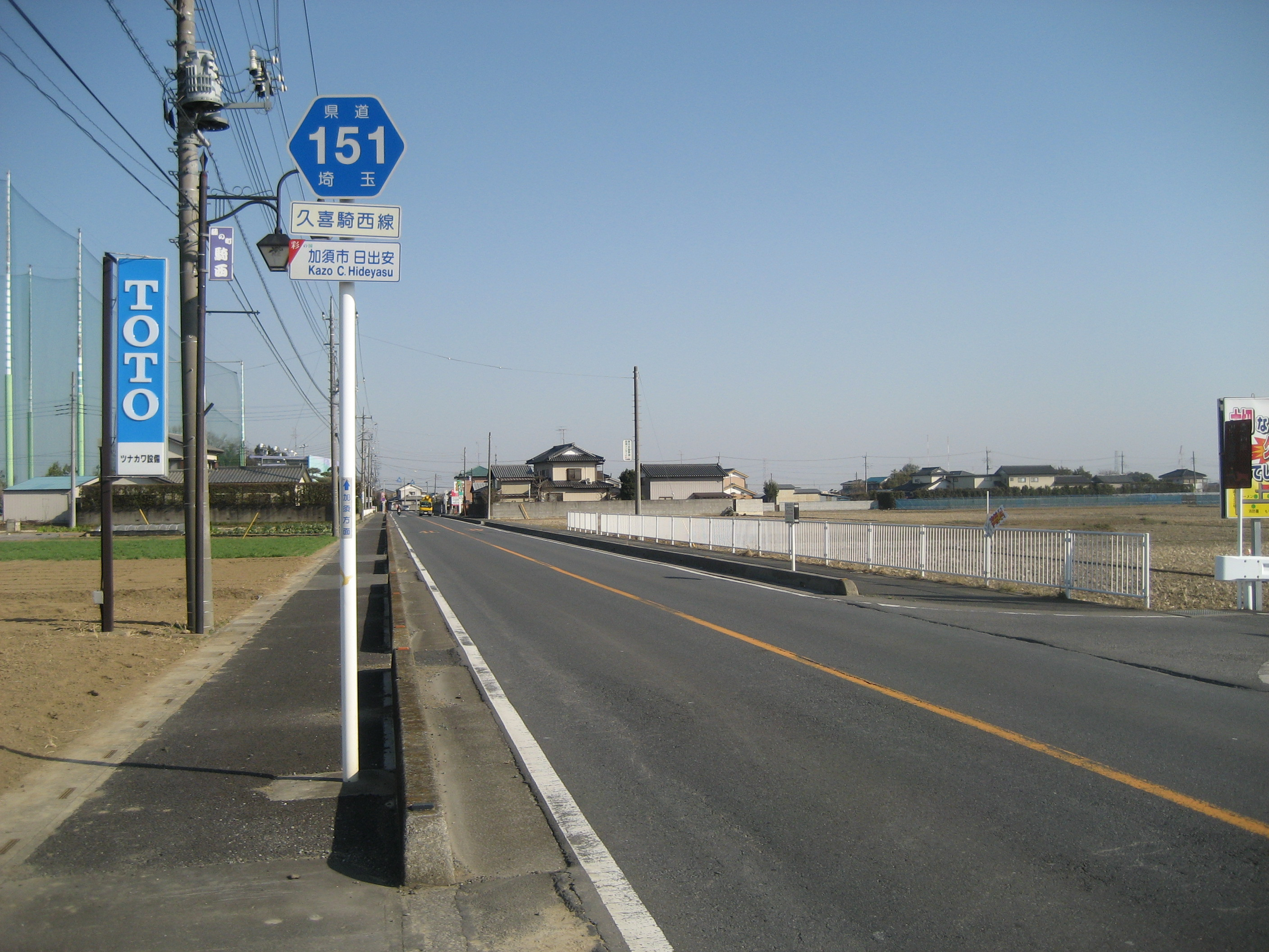 埼玉県道151号線加須市日出安付近